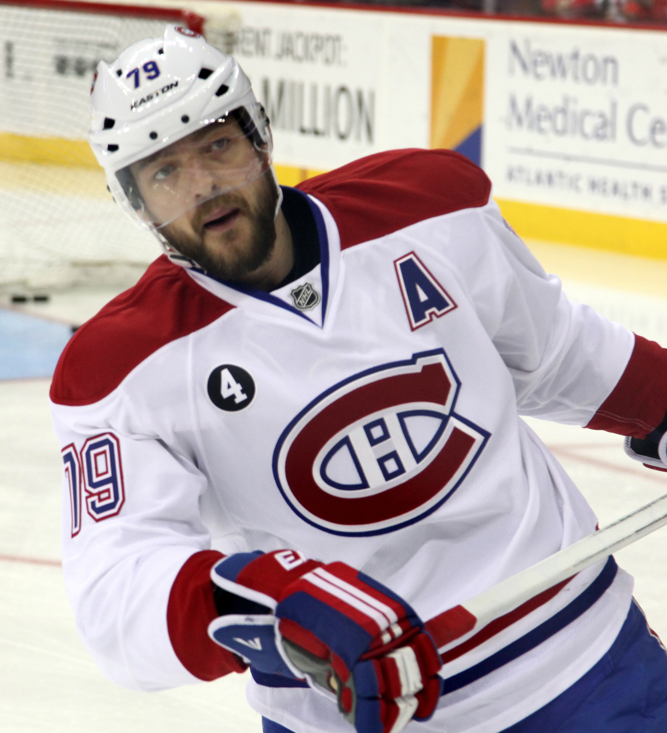 Andrei Markov in January 2015.